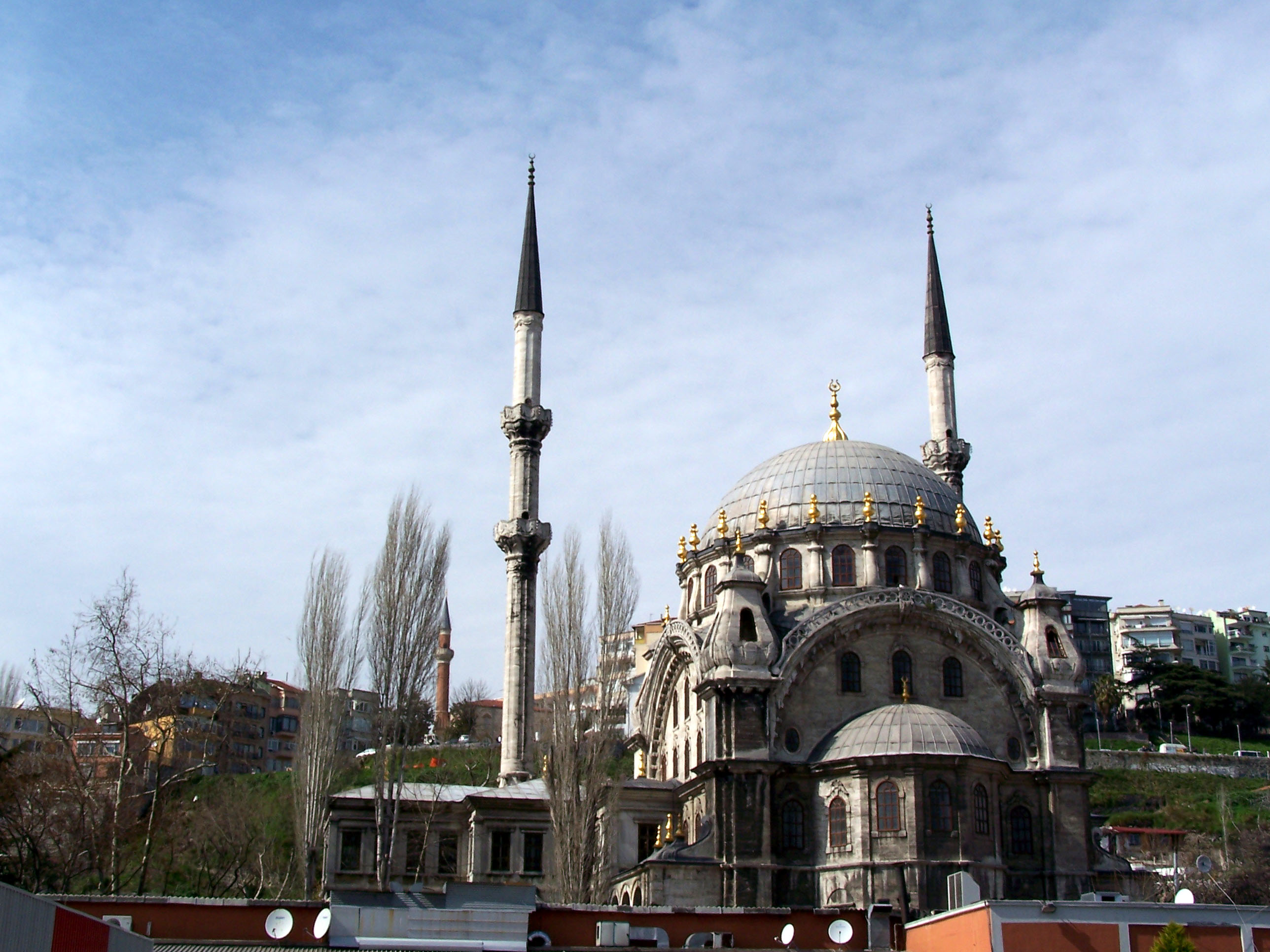 Nusretiye Camii in Tophane-Beyoğlu.